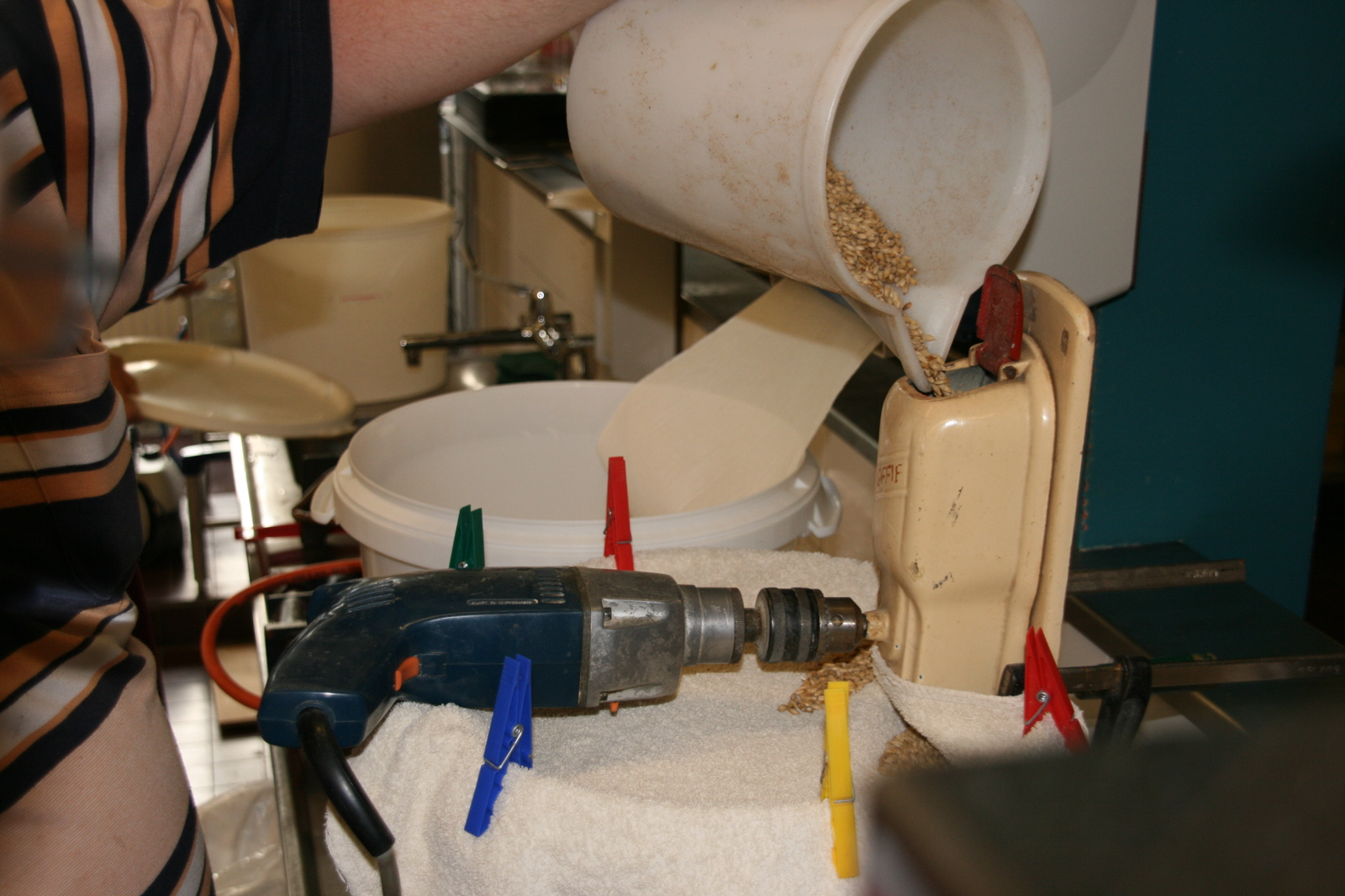 Schroten